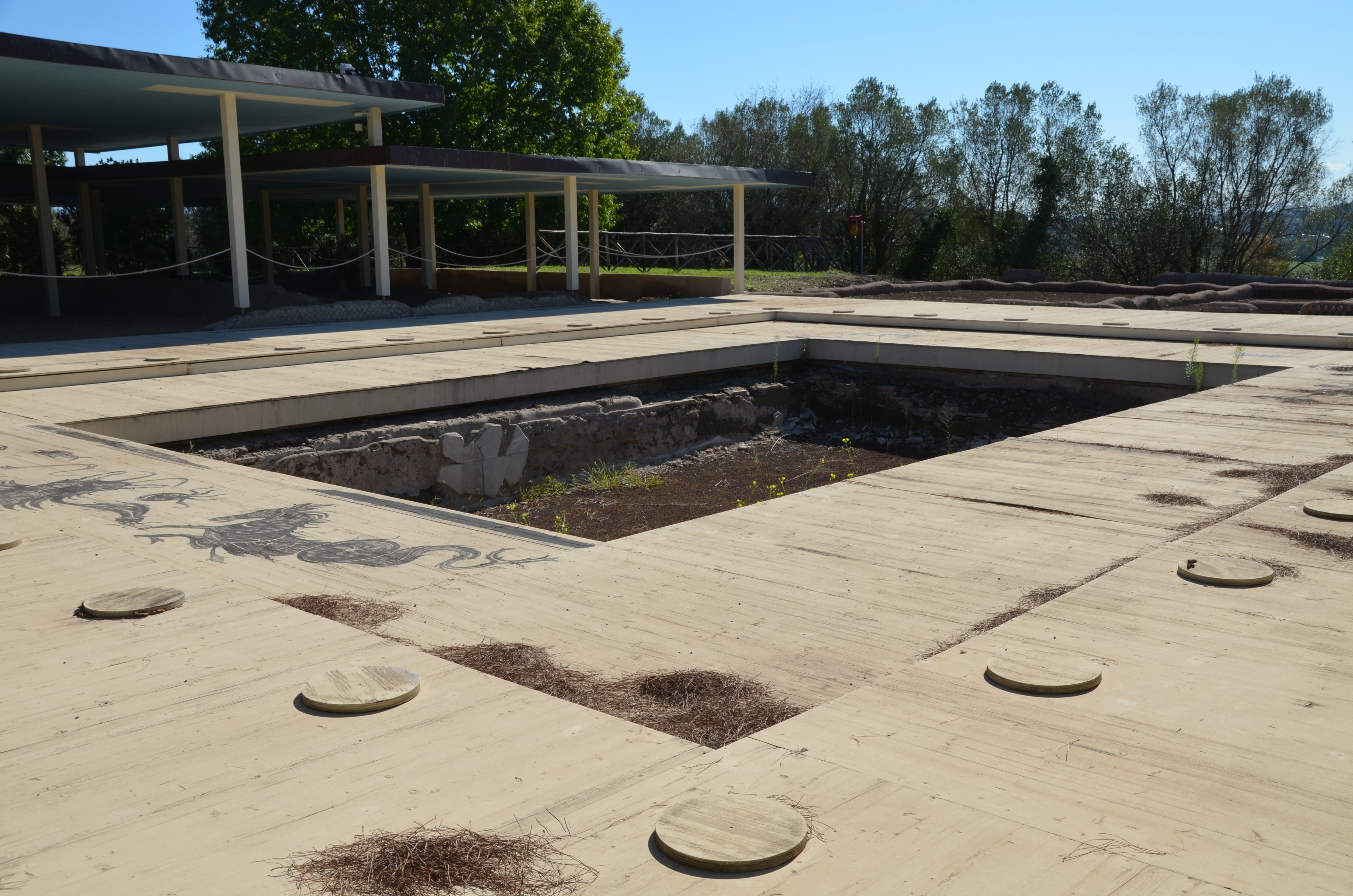 Villa of Livia, Prima Porta, Rome